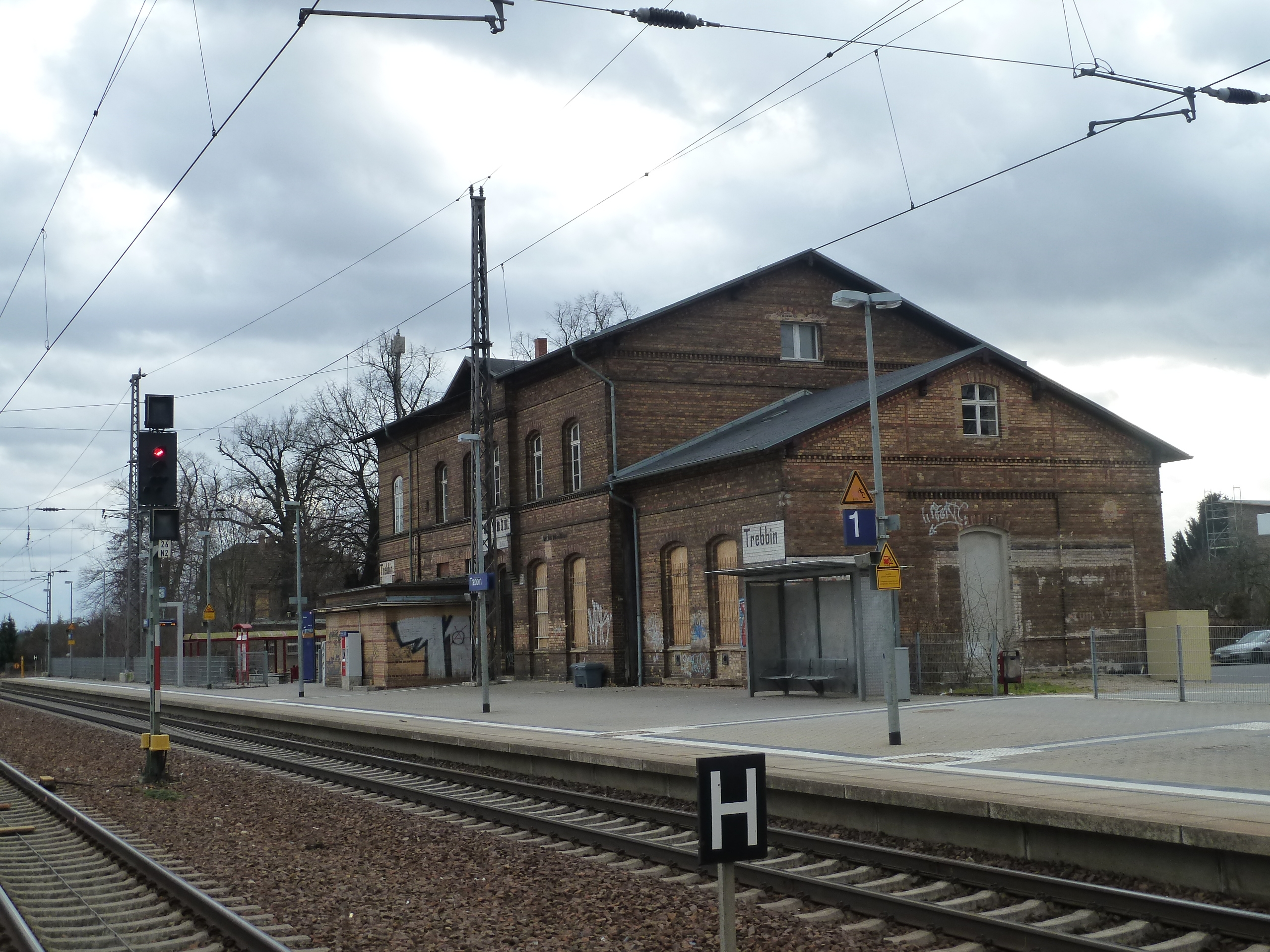 Bahnhof Trebbin, BahnsteigseiteUnknown trebbin railway station, view from platform